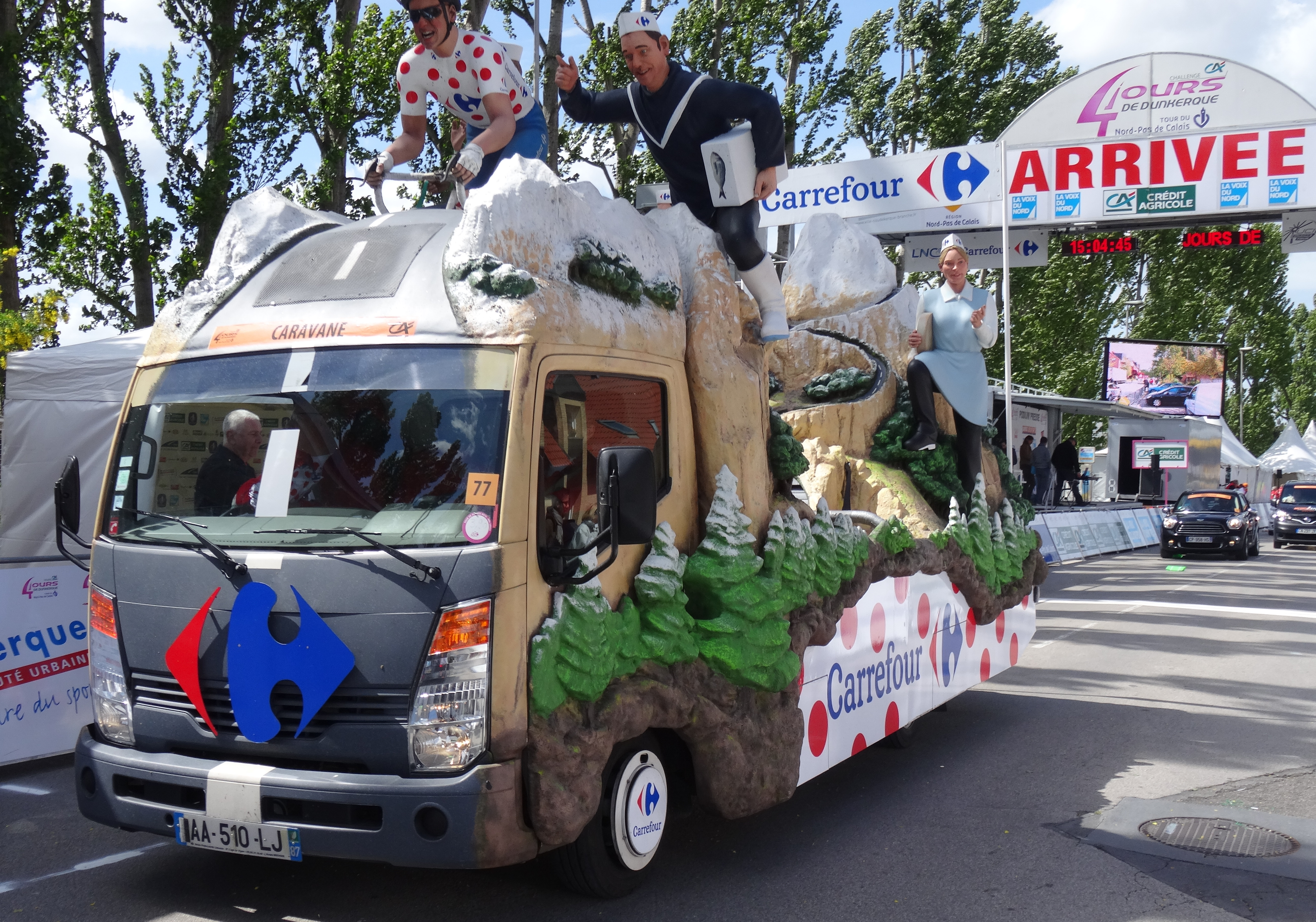 Reportage photographique réalisé le mercredi 7 mai 2014 à l'arrivée de la première étape de l'édition 2014 des Quatre jours de Dunkerque à Coudekerque-Branche, Nord, Nord-Pas-de-Calais, France.